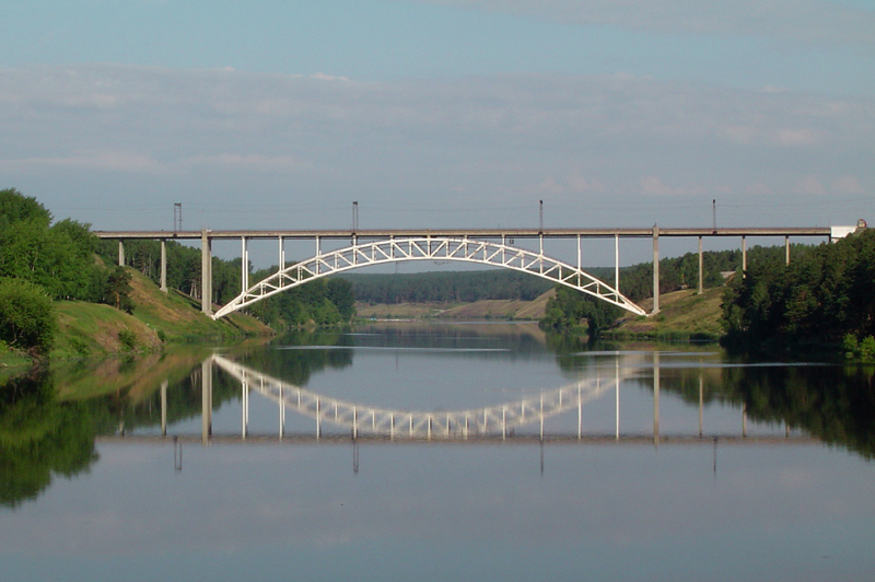 Железнодорожный мост через реку Исеть (г. Каменск-Уральский), 1939, автор проекта Росновский В.А., 140 м одноарочный мост из стальных труб, заполненных бетоном, памятник архитектуры областного значения, фото Денис Селиванов Railroad bridge over Iset river near Kamensk-Uralsky, 1939, Rosnovsky V.A., 140 m arch bridge of steel tubes filled with concrete, regional value landmark, photo Denis Selivanov.